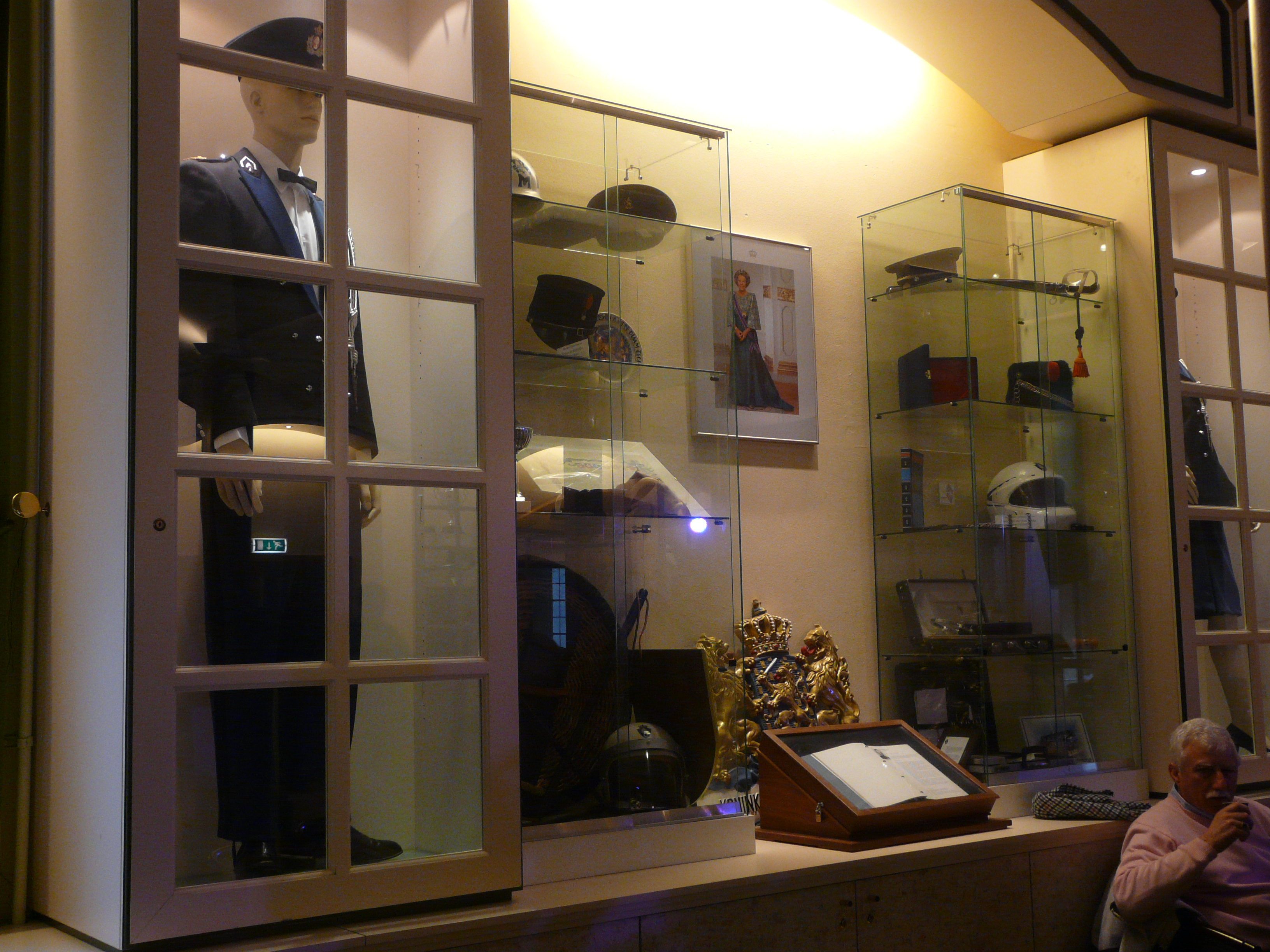 Detail van de Grote Zaal van Kasteel van Breda, Breda Centrum in Breda